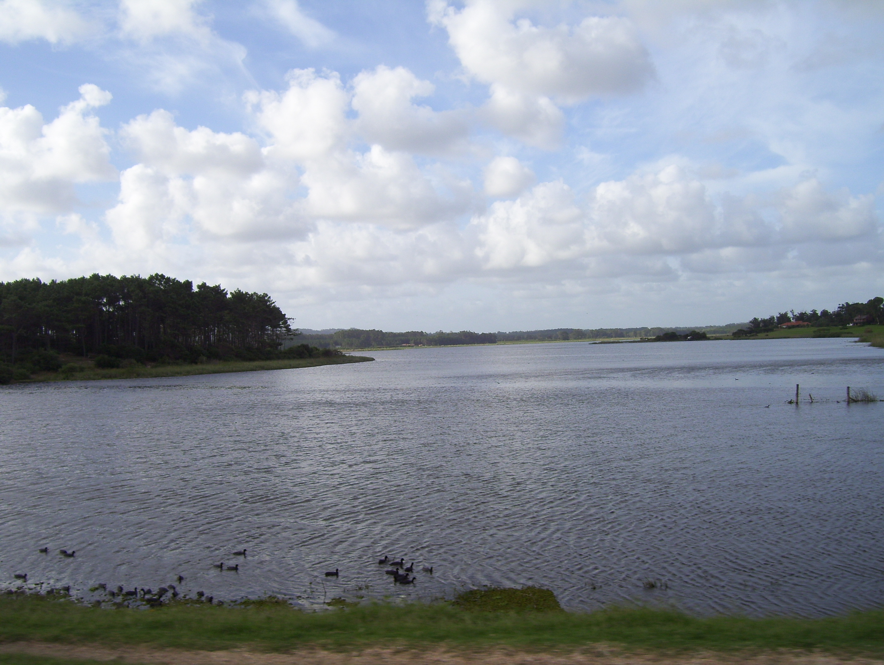 Vista de la Laguna del Diario desde la ruta Interbalnearia. (Maldonado, Uruguay)